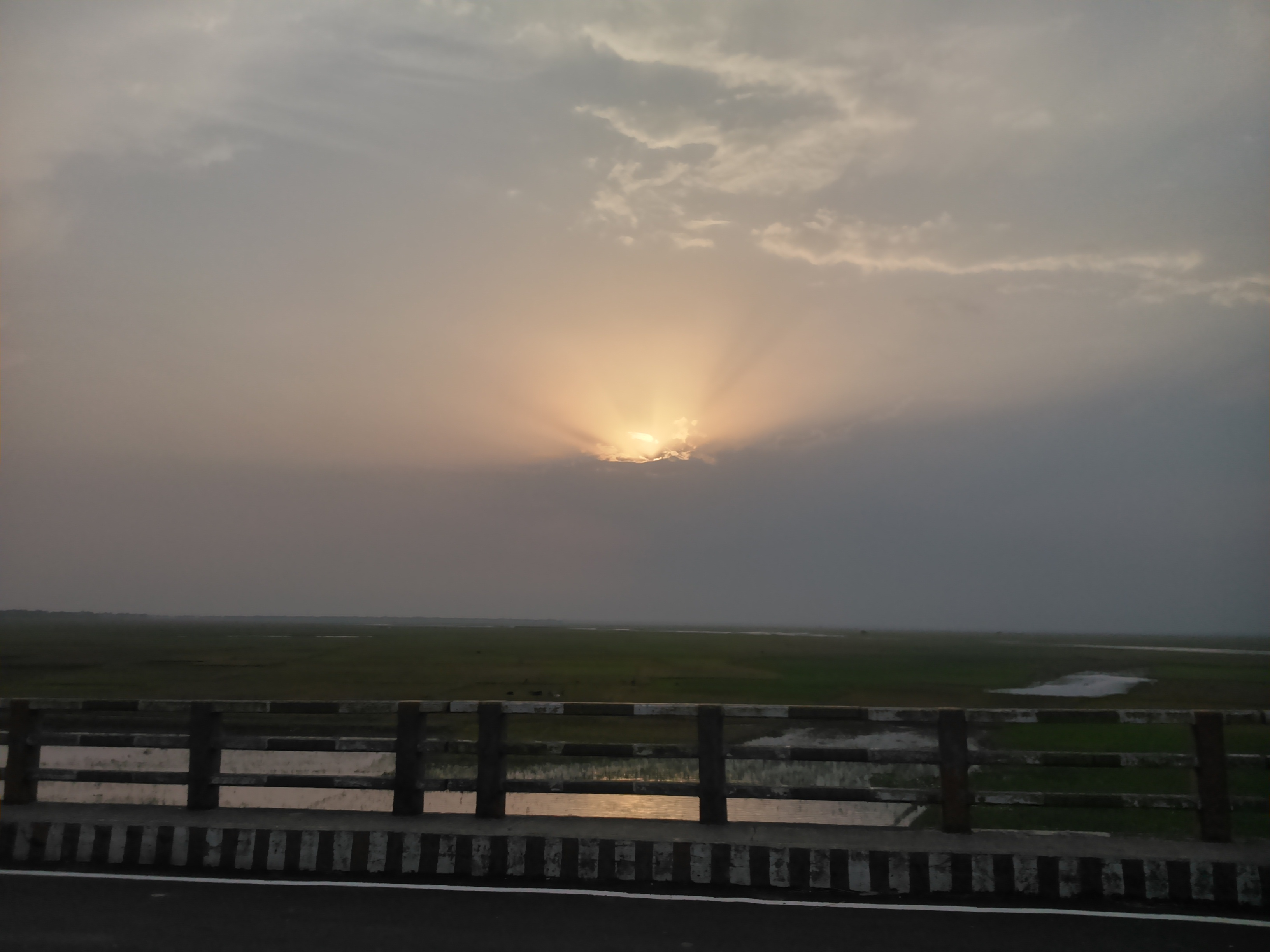 পড়ন্ত বিকেলে সরাইলের কালীকচ্ছ ইউনিয়নের ধরন্তি